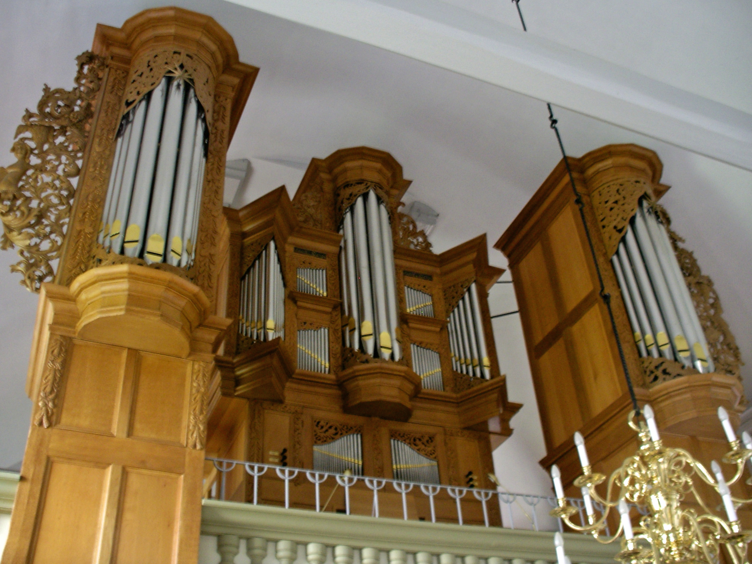 Orgel in Bützfleth, St. Nicolai